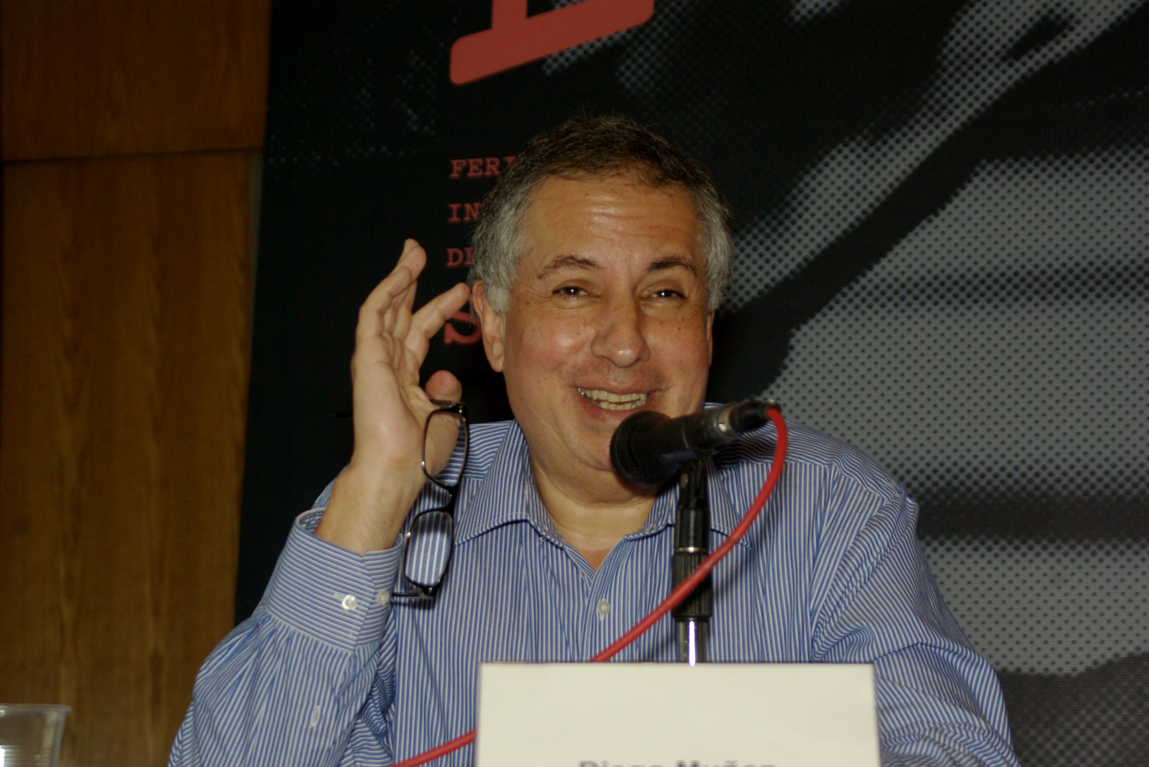 El escritor chileno Diego Muñoz Valenzuela durante la presentación de la novela 1946, los Nazis en Chiloé de Miguel Vera en la Feria Internacional del Libro de Santiago 2015